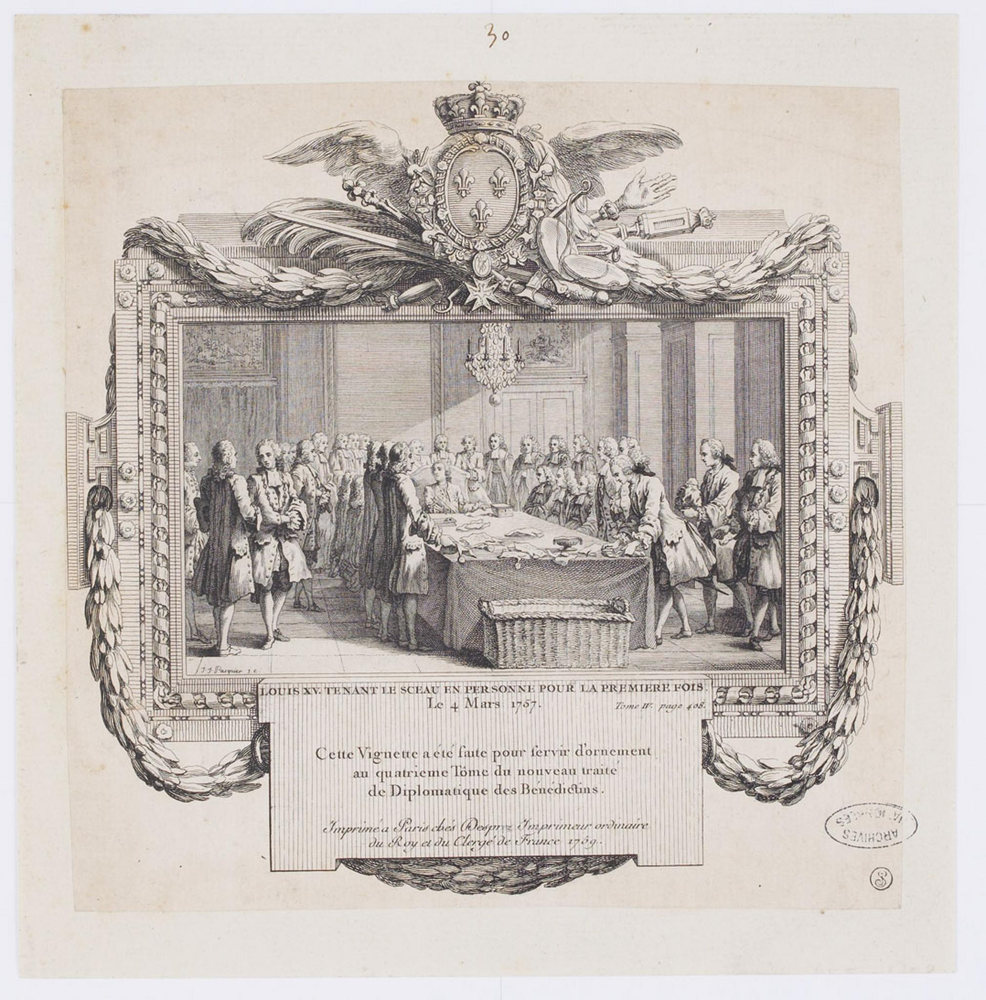 Gravure représentant Louis XV tenant le sceau en personne pour la première fois le 4 mars 1757. Cette vignette a été faite pour servir d'ornement au quatrième Tôme du traité Pratique des Bénédictins